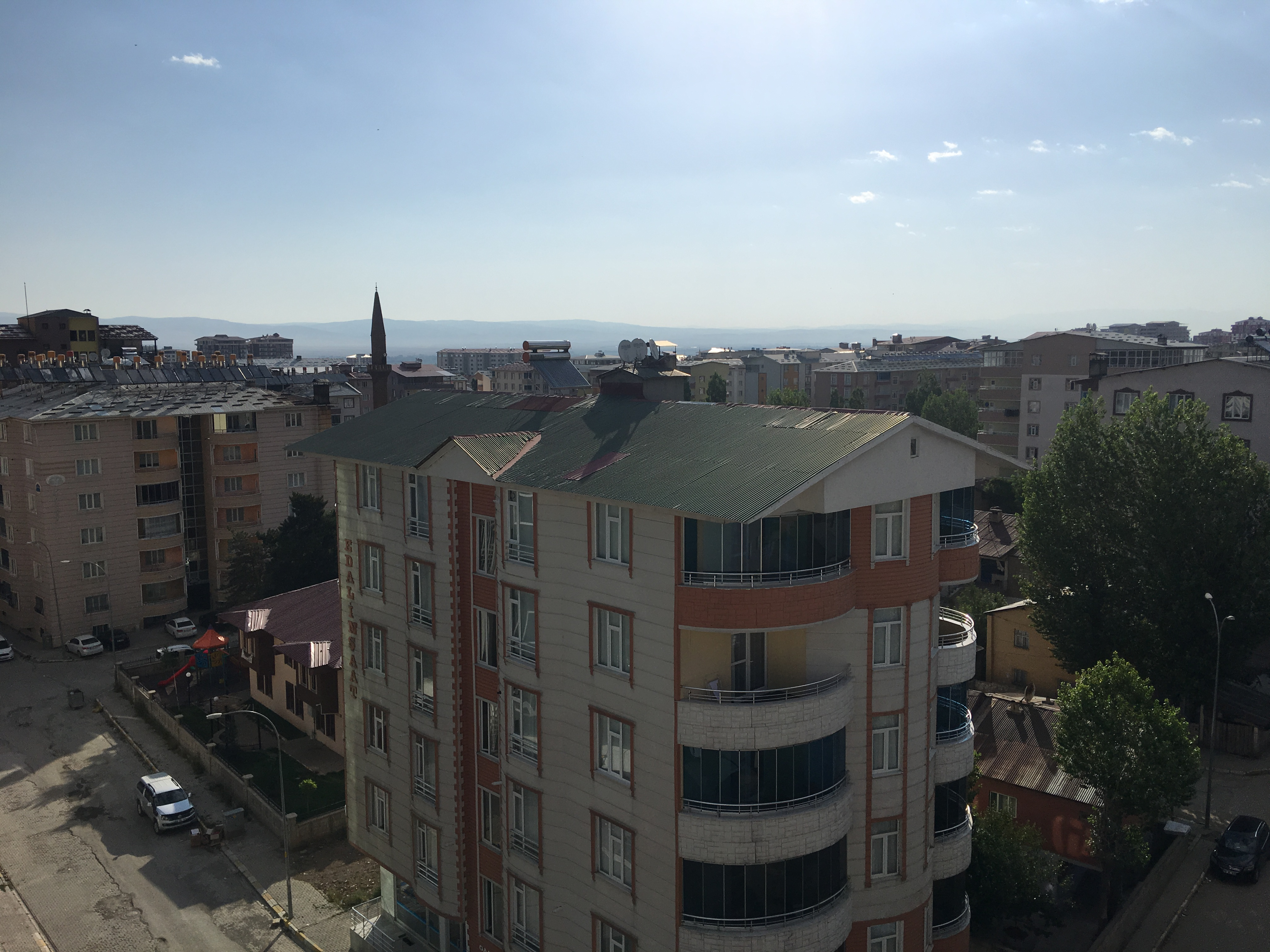 Սուլուխի կամուրջ